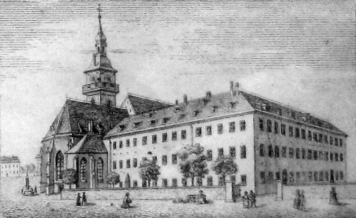 Hospitalkirche in Stuttgart und „Stuttgart, St. Catharina (Bürger-)Hospital“, Zeichnung und Lithographie von C. Schacher, 8,8 x 13,3 cm, 1850. – Schefold 8471. – Links Hospitalbrunnen.